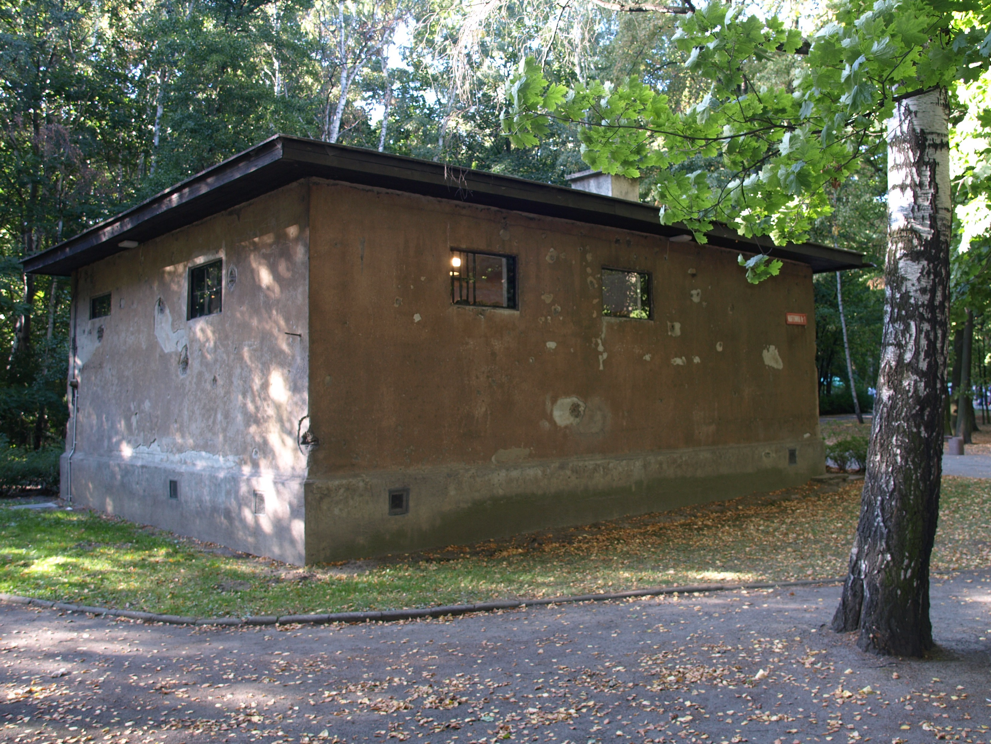 Gdańsk Westerplatte - Wartownia nr 1, 1925-1939